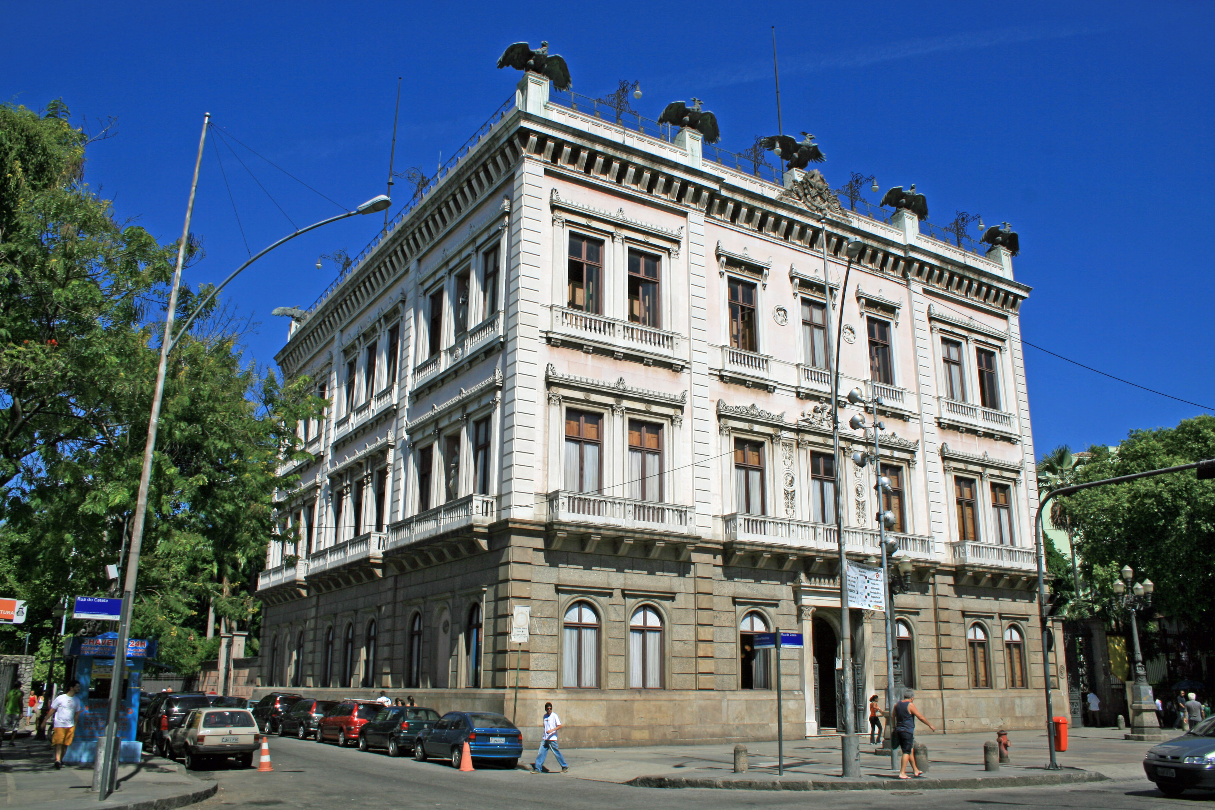 Rio de Janeiro, Brasil. Sede do poder republicano entre os anos de 1897 e 1960, o Palácio do Catete tem a arquitetura neoclássica com fachada revestida de granito e mármore rosa e portais emoldurados por mármore branco.